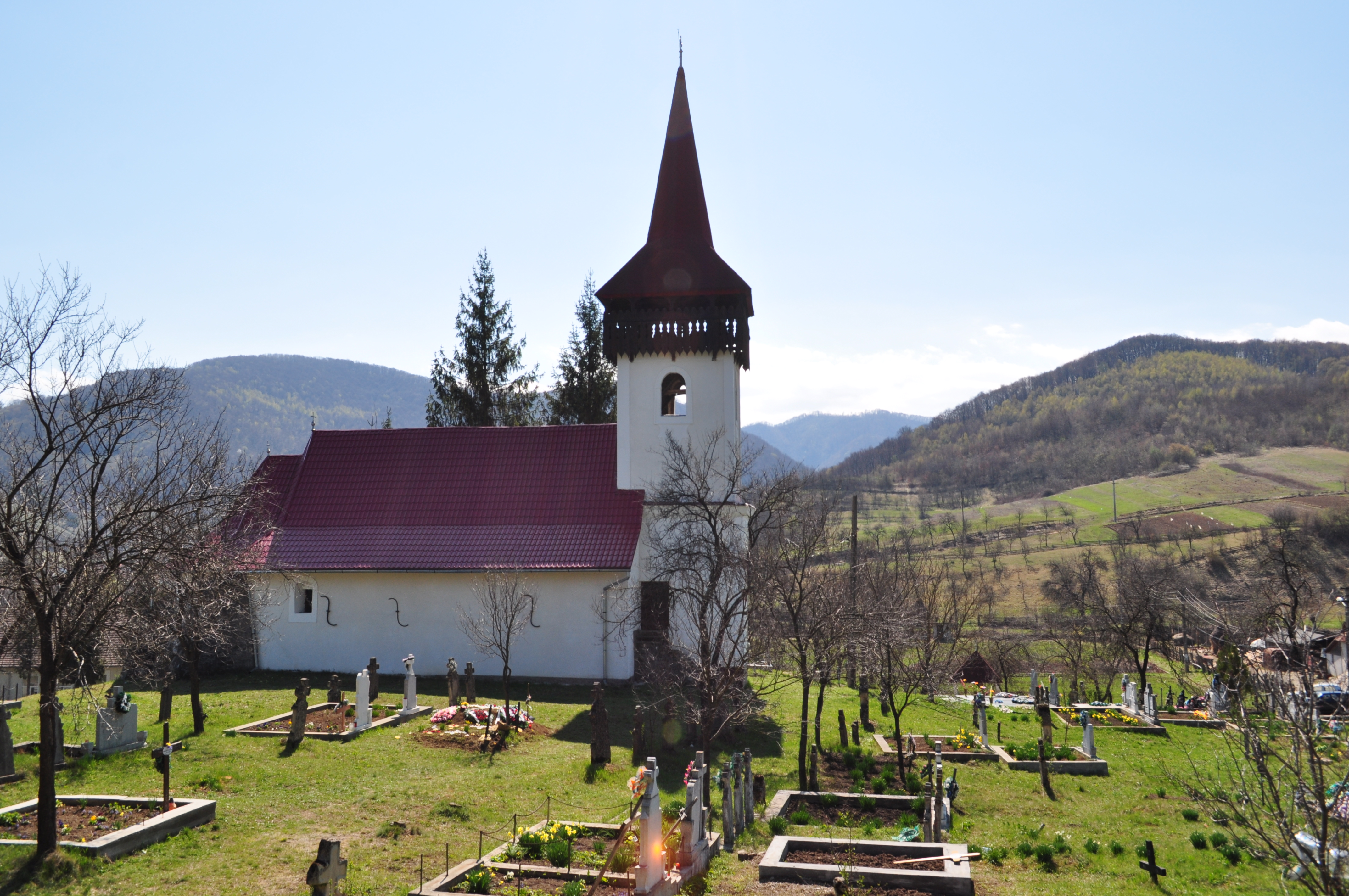 Biserica "Buna Vestire", sat ROŞCANI; comuna DOBRA